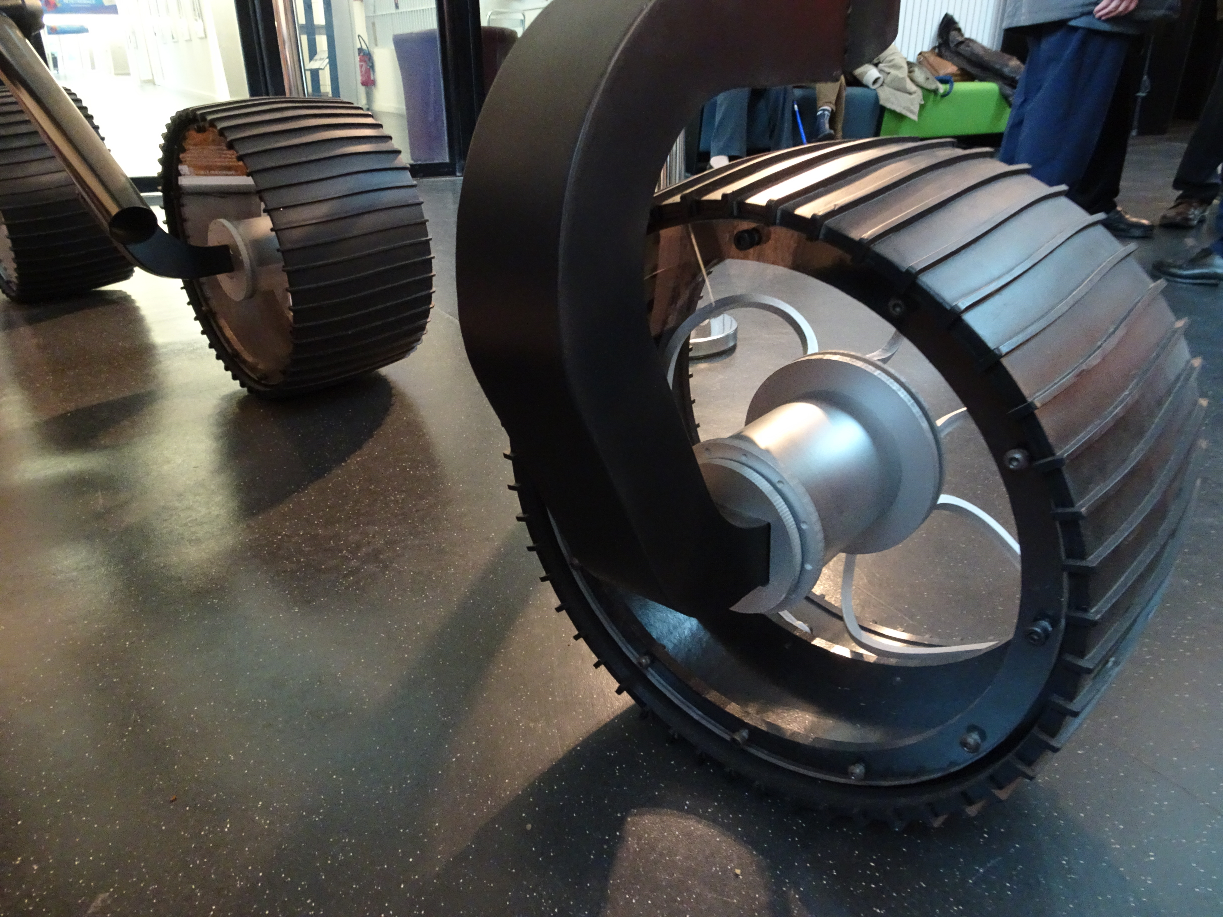 Maquette du rover de Mars 2020 exposé dans le hall du Latmos à Guyancourt en décembre 2017.